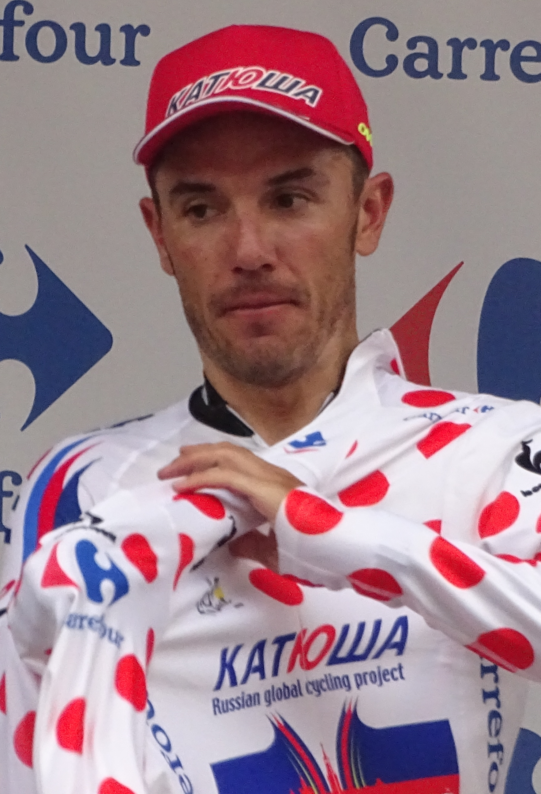 Reportage réalisé le mardi 7 juillet à l'occasion de l'arrivée de la quatrième étape du Tour de France 2015 à Cambrai, Nord-Pas-de-Calais, France.